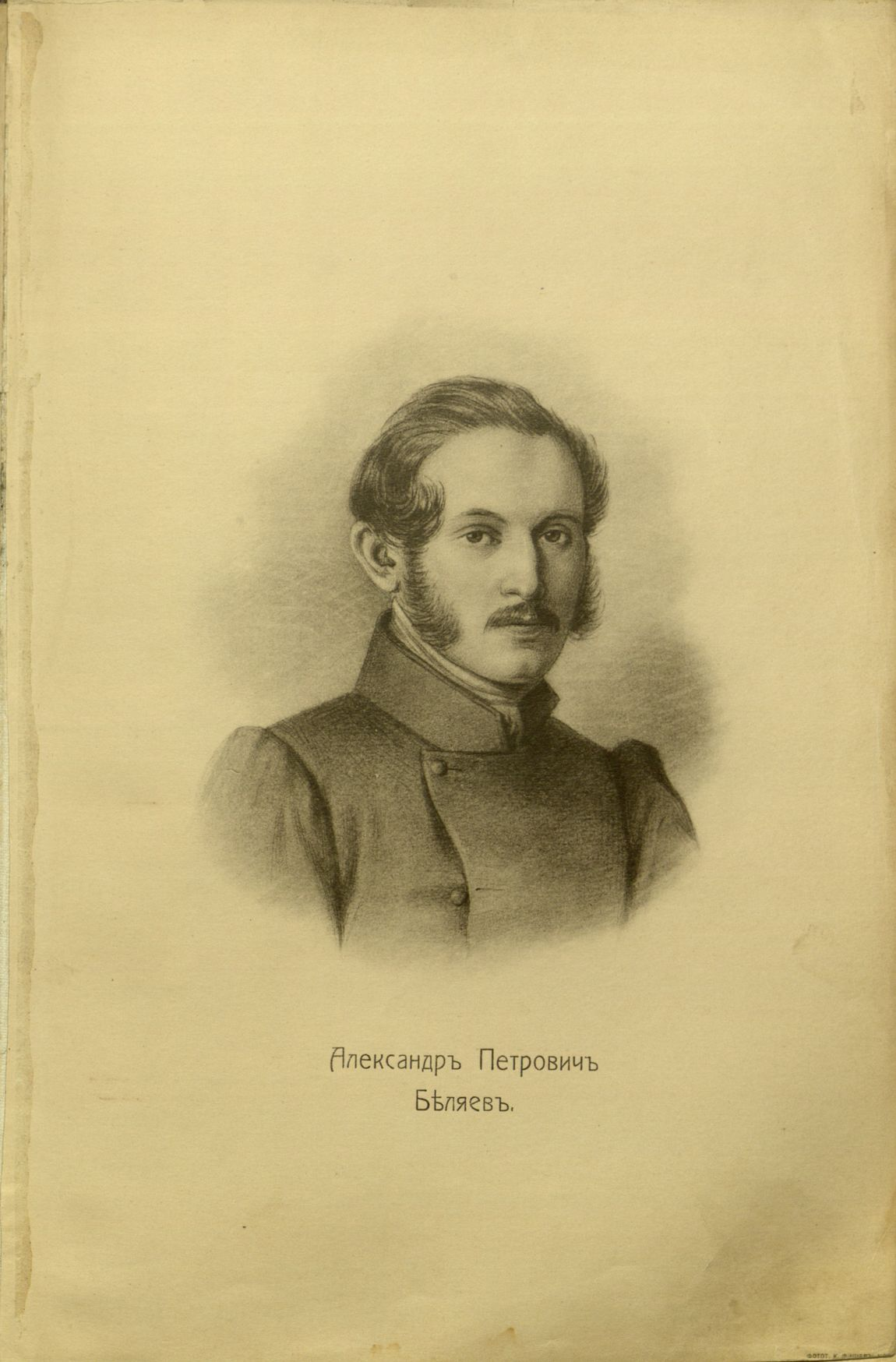 Головачев, П. М. Декабристы : 86 портретов, вид Петровского завода и 2 бытовых рисунка того времени. - М., [1906] Беляев, Александр Петрович